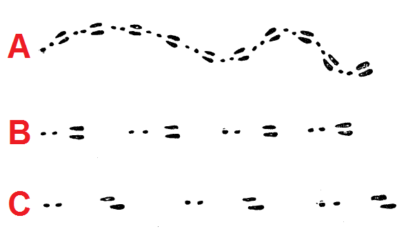 Spur eines Hasen - a = Spur beim Grasen, b = normale Laufspur, c = Fluchtspur * Source: Nordisk familjebok [1]